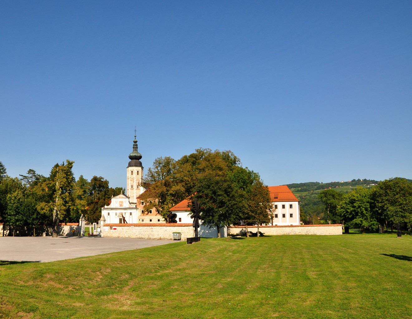 Kostanjevica (31)